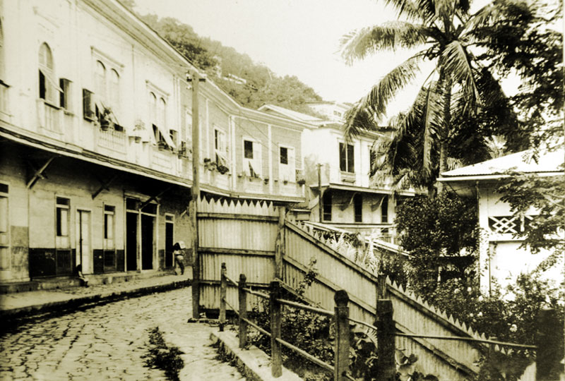 Foto del barrio Las Peñas, Guayaquil, en 1920.